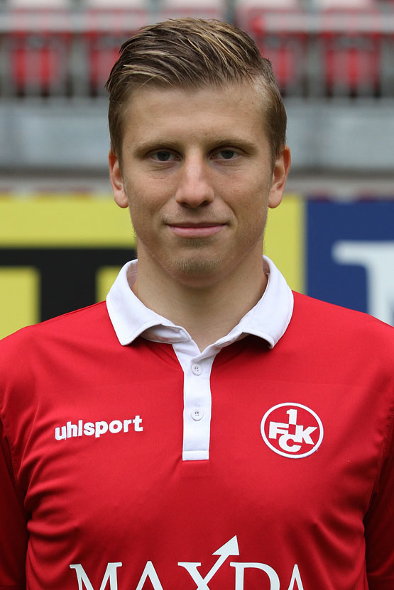 Marcus Piossek